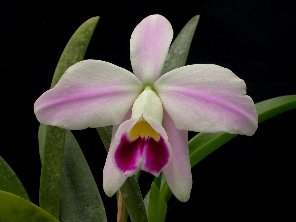 Hadrolaelia pumila